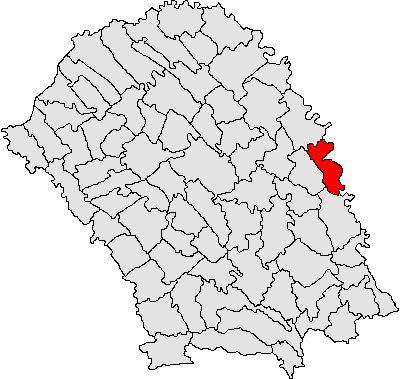 Categorie:Hărţi ale judeţului Botoşani